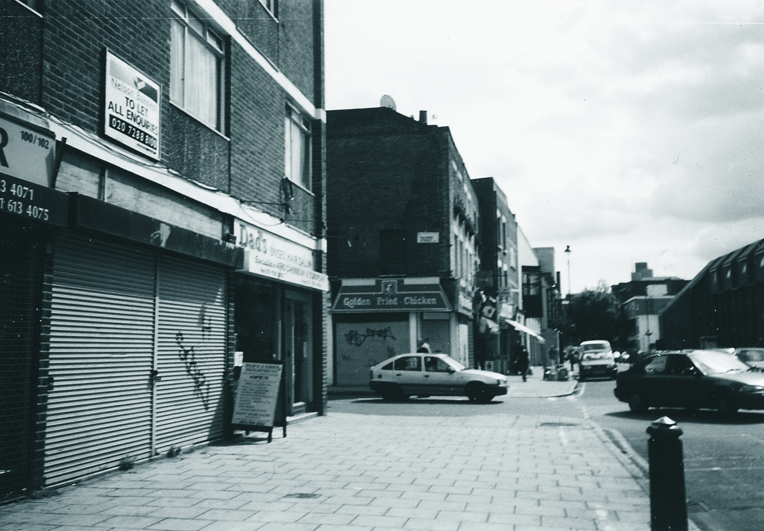 Die Hoxton Street vom Hoxton Market aus in Richtung und mündend auf der Old Street (nahe der Tube-Station), der Richard Ashcroft entlang rempelte im The Verve- Video zu "Bitter Sweet Symphony" (Original text: Hoxton Street in Shoreditch, London)